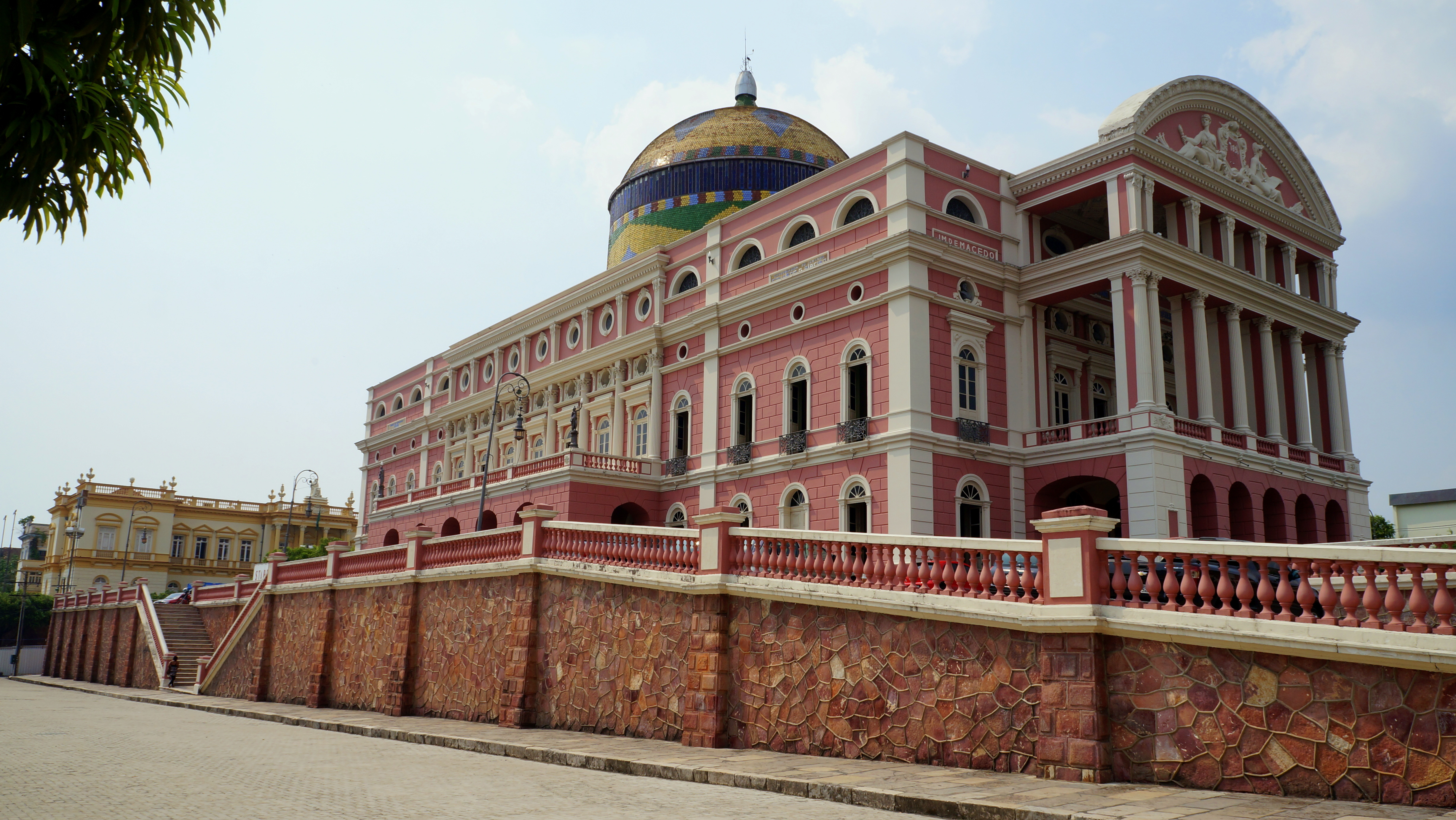 Teatro Amazonas em Manaus.